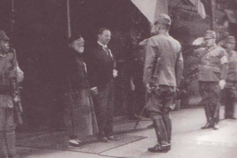 中文（香港）: 周壽臣於日佔時期時出入有日軍向他敬禮